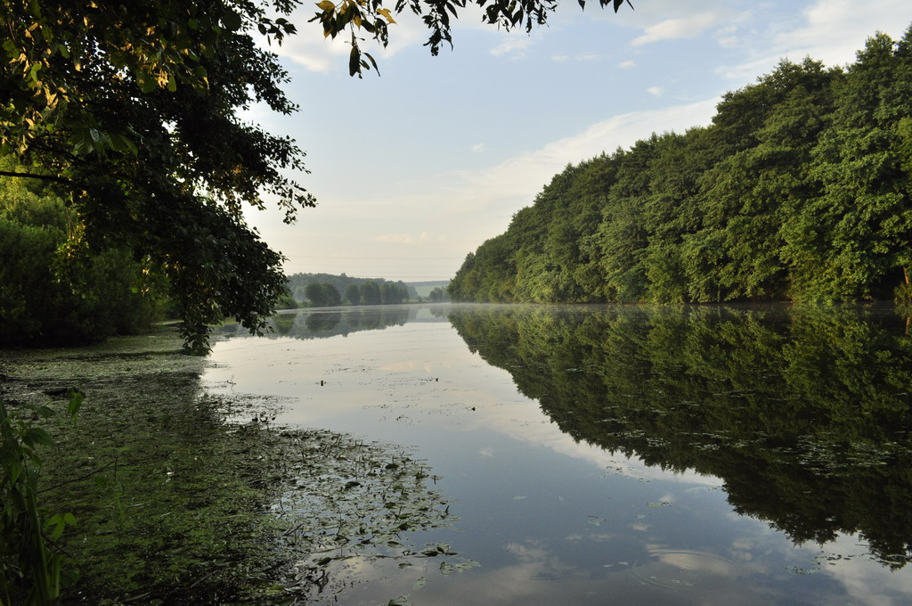 Південний Буг пейзаж